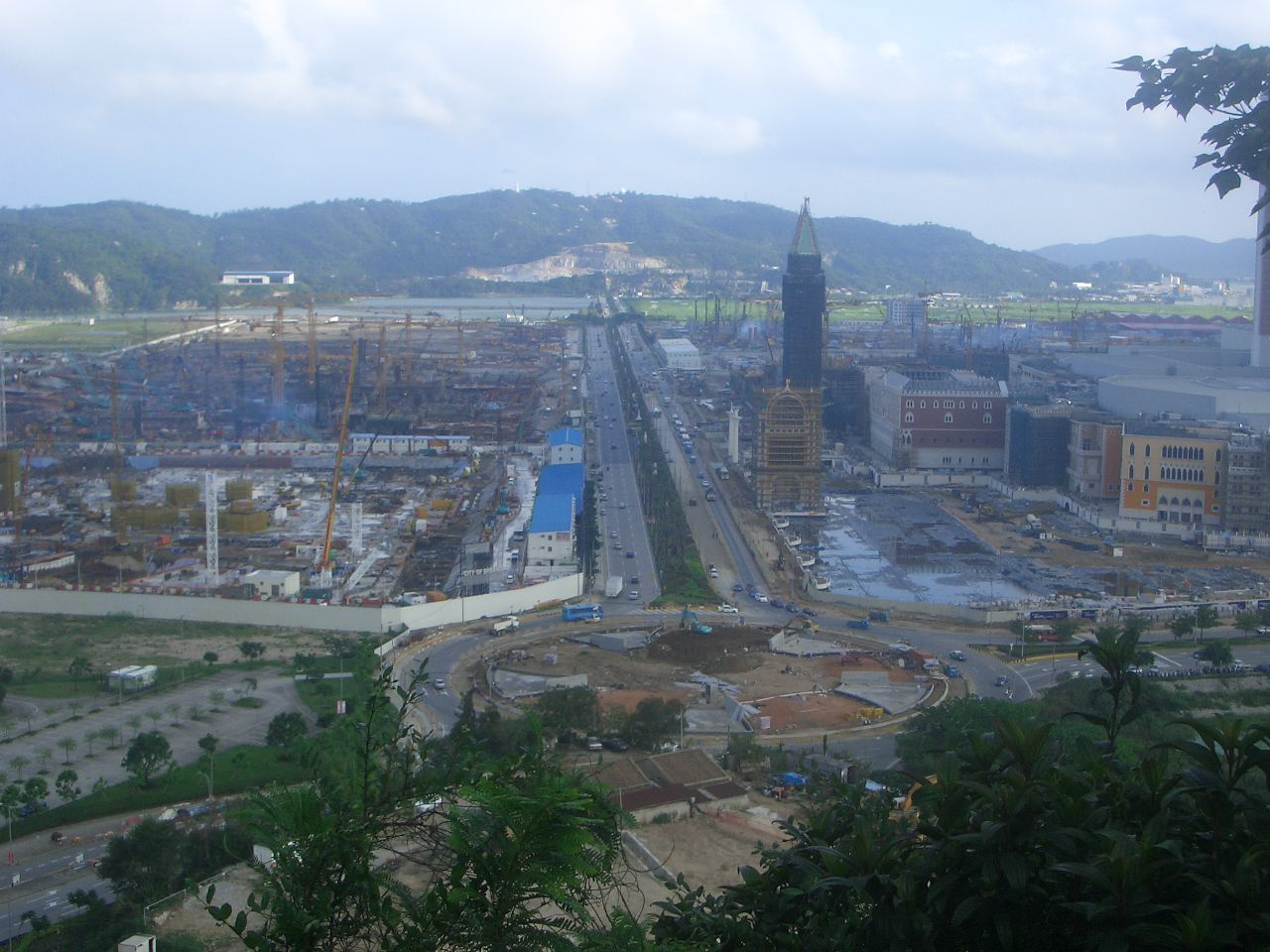 2007年路氹城面貌